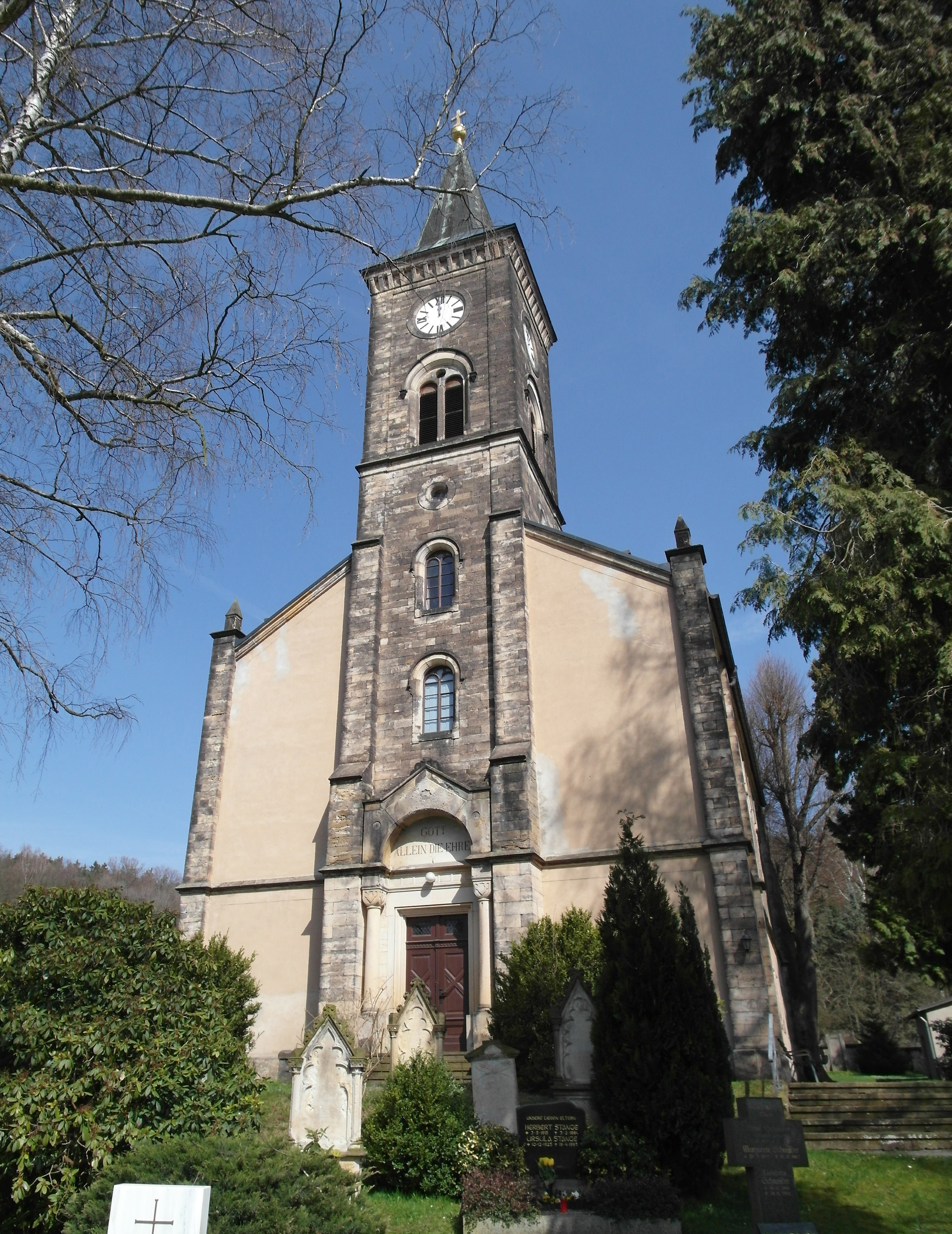 05.04.2016 01824 Cunnersdorf (Gohrisch): Dorfkirche, Cunnersdorfer Straße 48 B (GMP: 50.887270,14.113061). Die neoromanische Saalkirche von Cunnersdorf wurde in der heutigen Form in den Jahren 1854/55 vom Maurermeister Oskar Hofmann aus Königstein errichtet. [SAM4100.JPG]20160405150DR.JPG(c)Blobelt